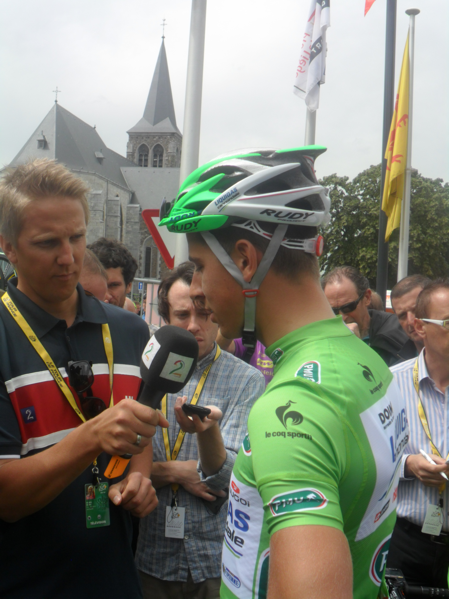 Team Liquigas in Visé voor de start van de 2e etappe van de Tour de France 2012.